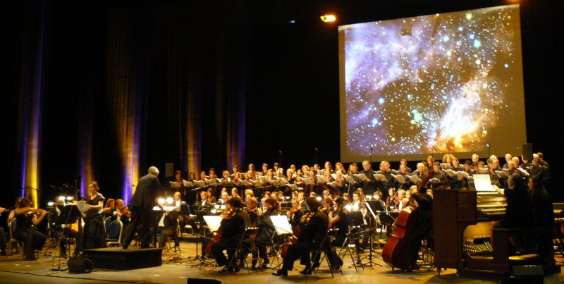 l'Orchestre régional de Cannes-Provence-Alpes-Côte-d’Azur joue ecce_cor_meum de Paul McCartney pour la première fois en France à Nice